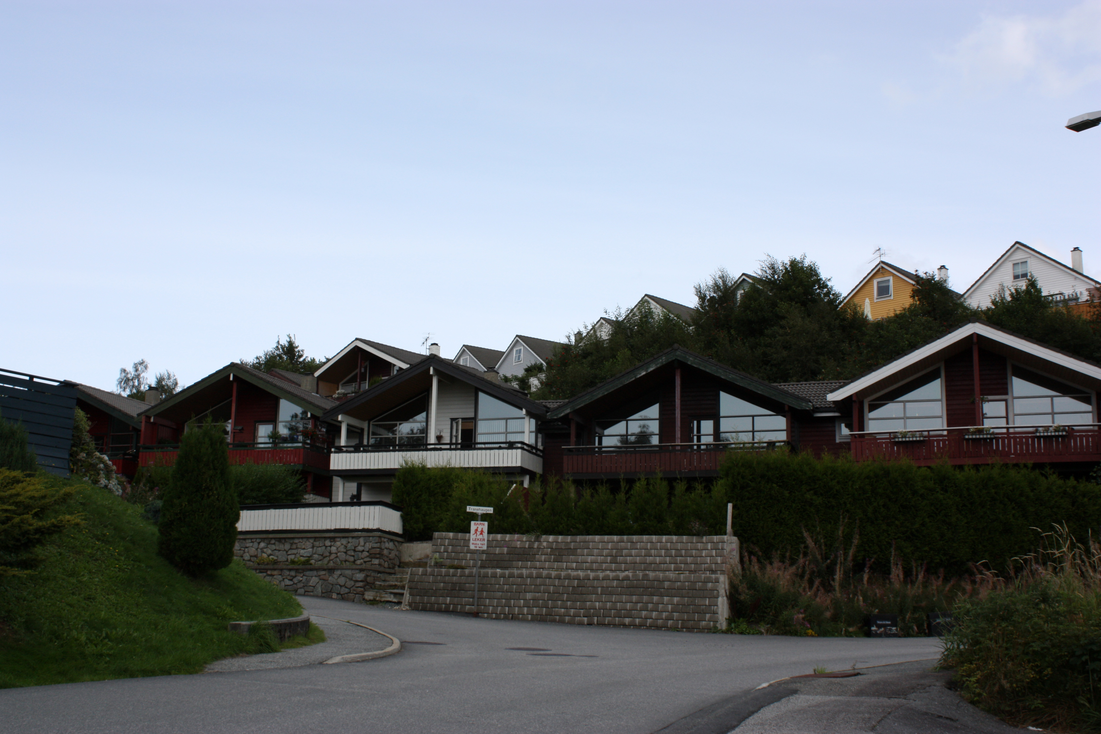 Tranehaugen, Fana, Bergen. August 2009.